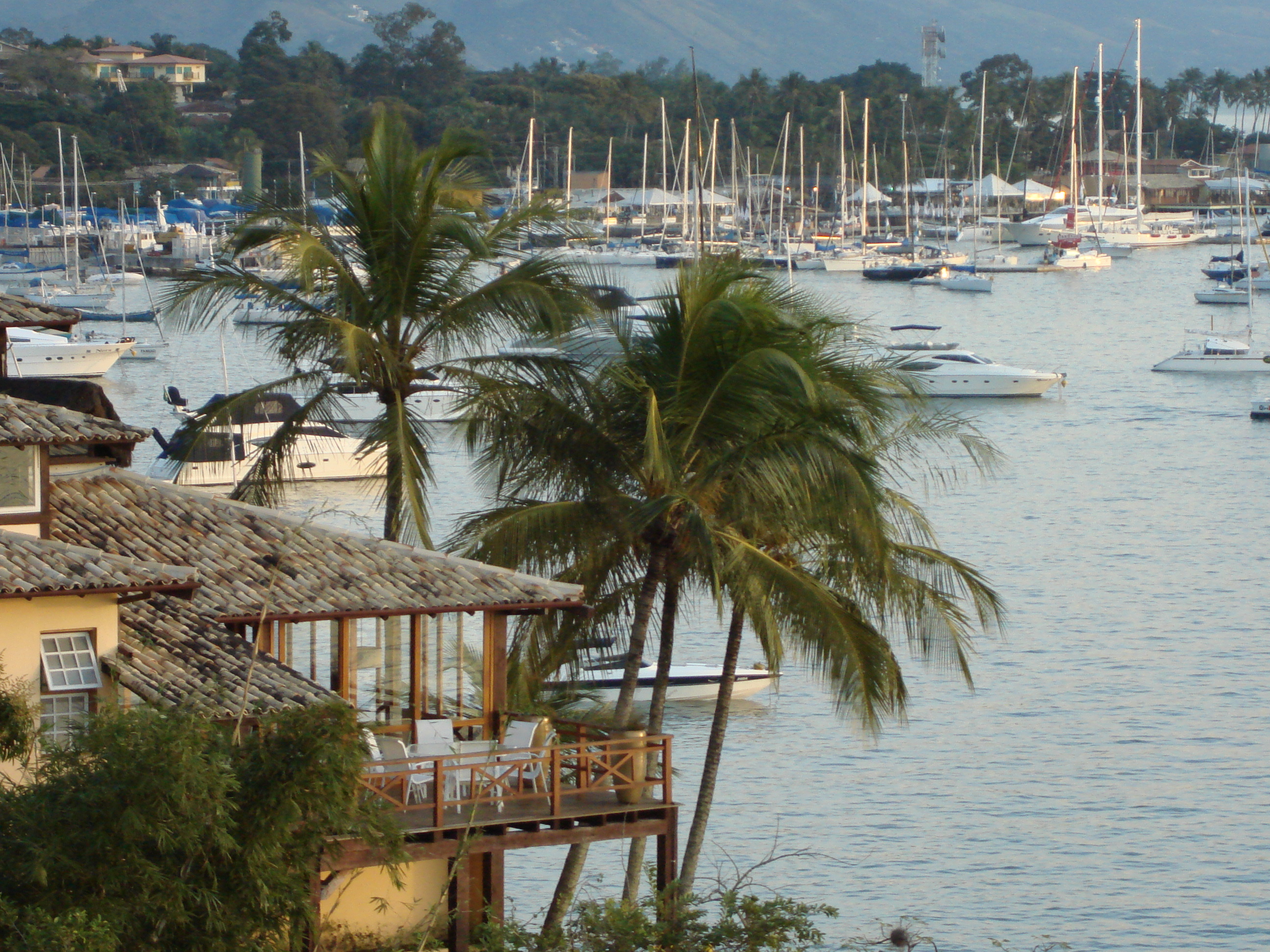 Ilha Bela, São Paulo, Brasil